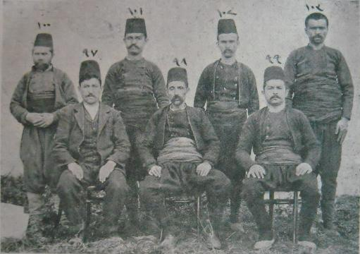 Осъдените от Одринския военен съд при Габровската афера в 1902 година българи от Габрово, Ксантийско.